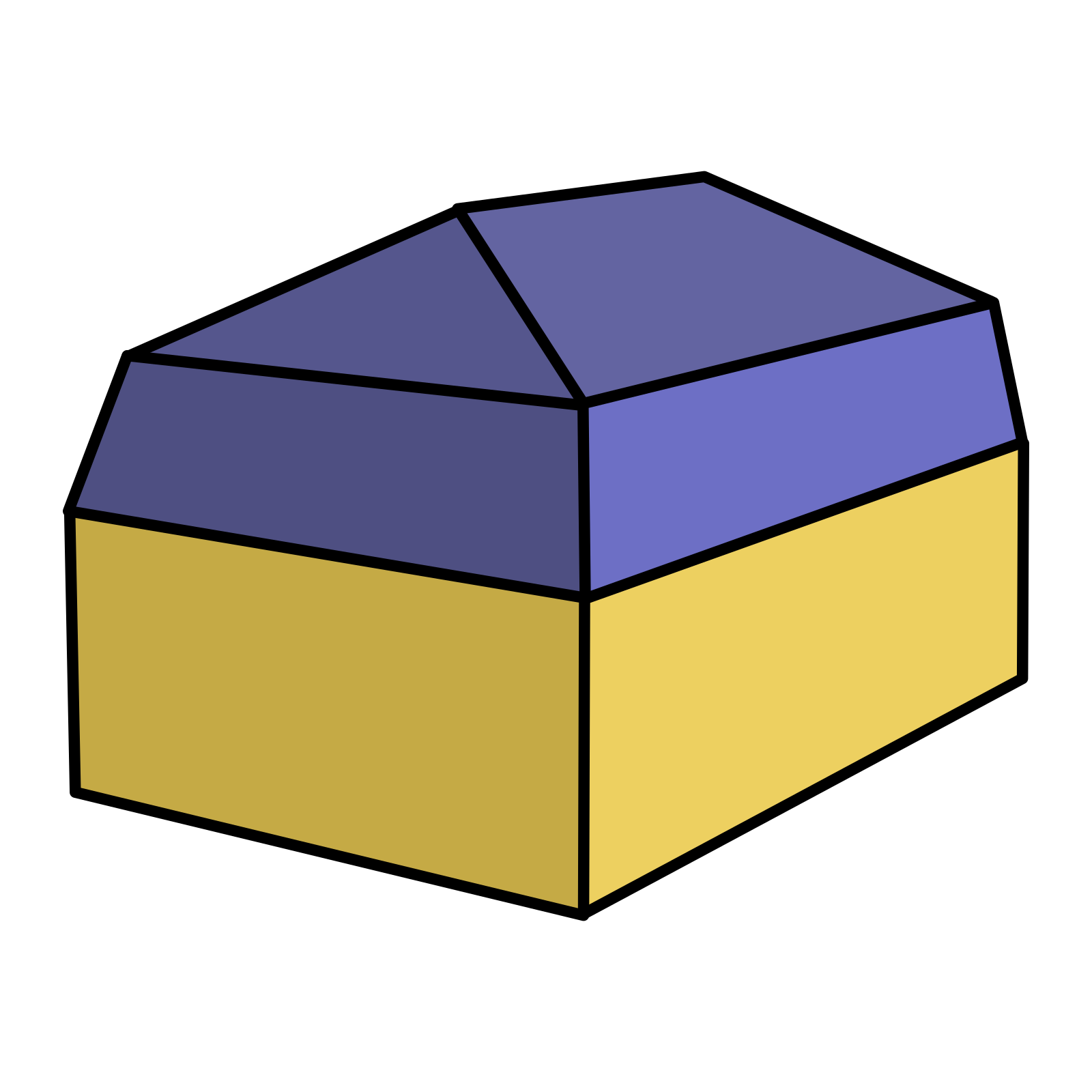 Ein Mansarddach, bei dem alle vier Dachflächen abgeknickt sind.